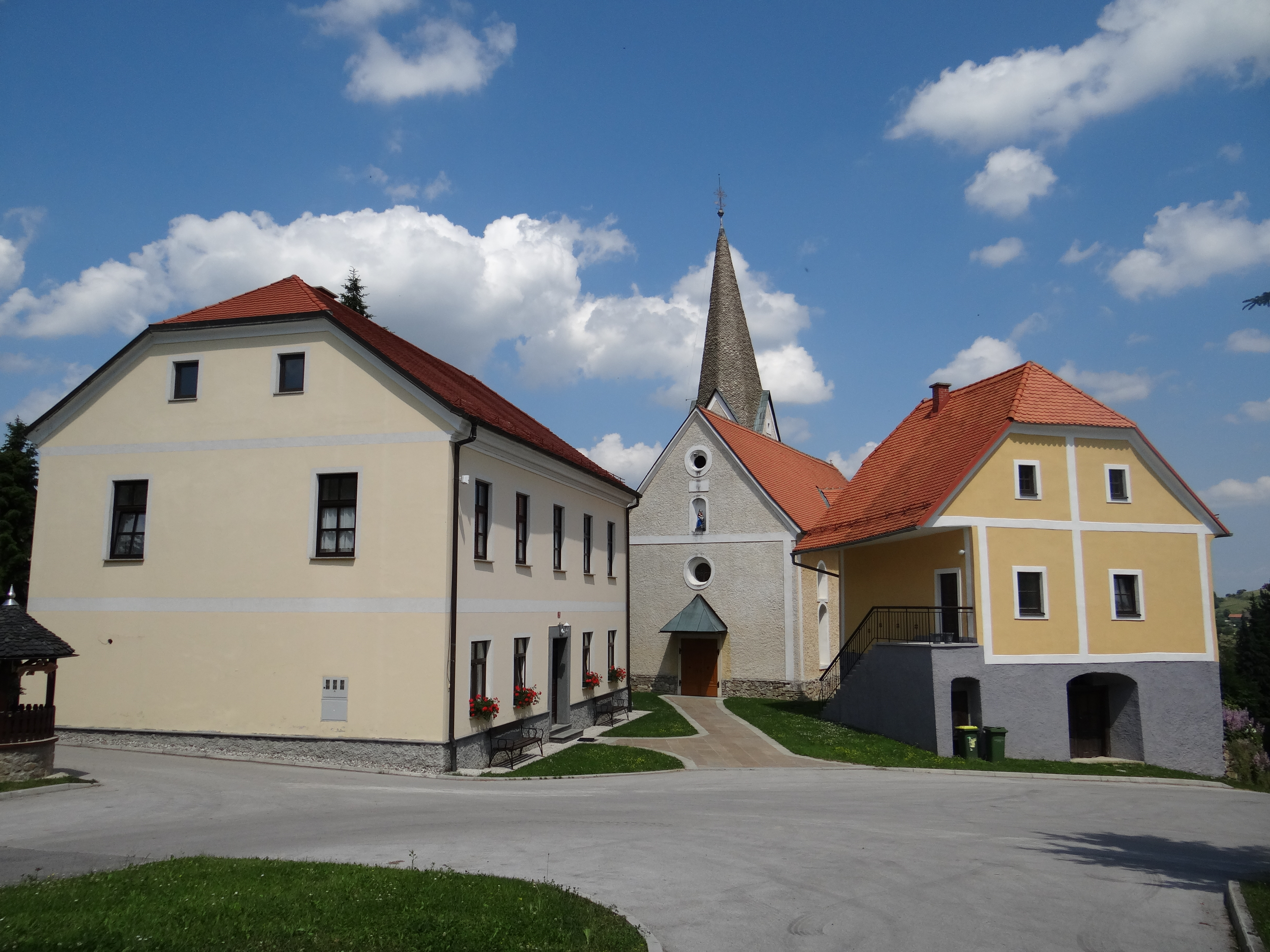 Župnijsko poslopje Župnije Slivnica pri Celju.